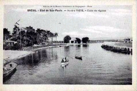 Rio Tietê em 1905 - São Paulo Brasil